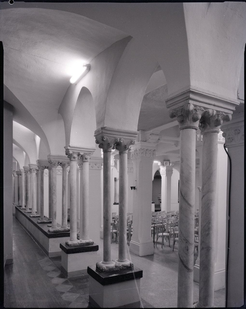 Servizio fotografico : Genova, 1963 / Paolo Monti. - Buste: 8, Fototipi: 8 : Negativo b/n, gelatina bromuro d'argento/ pellicola ; 10x12. - ((Serie costituita da 8 buste sciolte di negativi identificati con i nn.: 7358, 7373, 7374, 7375, 7376, 7377, 7378, 7379. - Su rubrica denominata "R 1 - Monti/ 1 aprile 1963 - 6 giugno 1964/ 6000-8193" in corrispondenza dell'indicazione della suddetta serie appunto manoscritto: "Villa Sampierdarena Scuola (presso il chiostro/ trasformato in ballo ENAL)". - Il negativo identificato con il numero 46397 è stato realizzato per Zodiac. - Occasione: Documentazione per la pubblicazione: Italia Nostra (a cura di), "Le ville genovesi", catalogo della mostra, Genova 1962, Genova, Comune di Genova, 1967. - (1963-1964), presso Archivio Paolo Monti. - Fonte: Monografia di Italia Nostra (a cura di): Le ville genovesi, catalogo della mostra, Genova 1962, Genova, Comune di Genova (1967). - Fonte: Lettera di Paolo Monti: I. Carteggi/ Genova - Enrico (1963-1966), presso Archivio Paolo Monti. Camicia con documenti dattiloscritti e manoscritti vari relativi al lavoro eseguito per Italia Nostra: preventivi, lettere, inventari. - Fonte: Rubrica di Paolo Monti: Archivio fino 1-4-1961/ 31-3-1963 (1961-1963), presso Archivio Paolo Monti. - Fonte: Agenda di Paolo Monti: R 1 - Monti/ 1 aprile 1963 - 6 giugno 1964/ 6000-8193